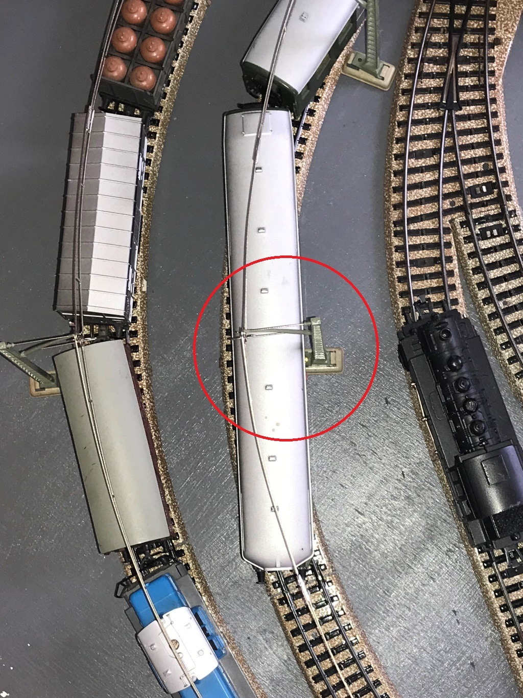 Situation mit verkürzten Kleinbahn Personen- und Güterwagen auf einer Märklin Modelleisenbahnanlage mit älteren Metallgeleisen und Fahrleitung in der SpurH0. Gut sichtbar die Kollisionsgefahr bei Fahrleitungsmasten, trotz des in der Länge gekürzten älteren grünen Steuerwagens nach Vorbild der Schweizerischen Bundesbahnen (SBB) mit dem Fahrleitungsmasten in einer Kurve mit einem Radius von 360 mm.